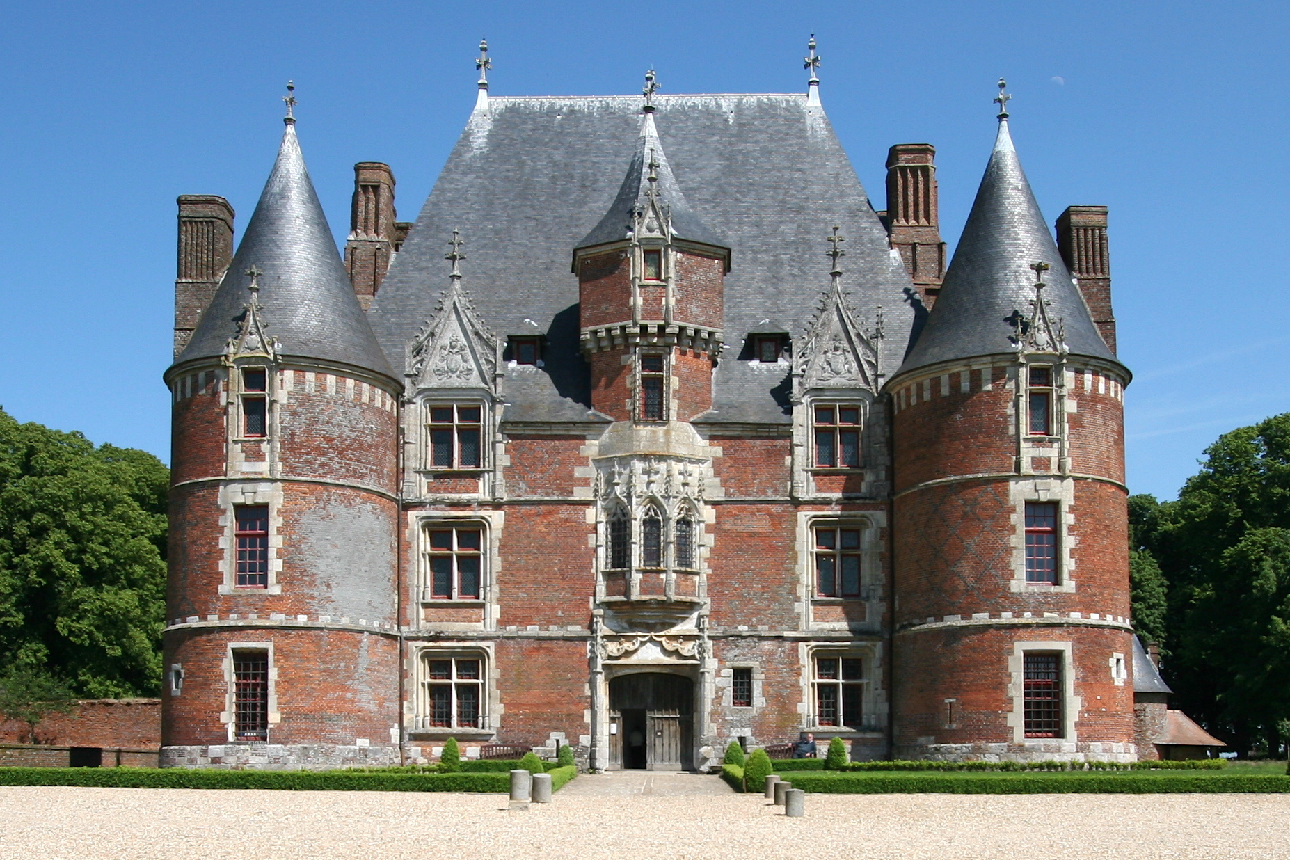 Chateau de Martainville, Normandie, France. Vue de face.